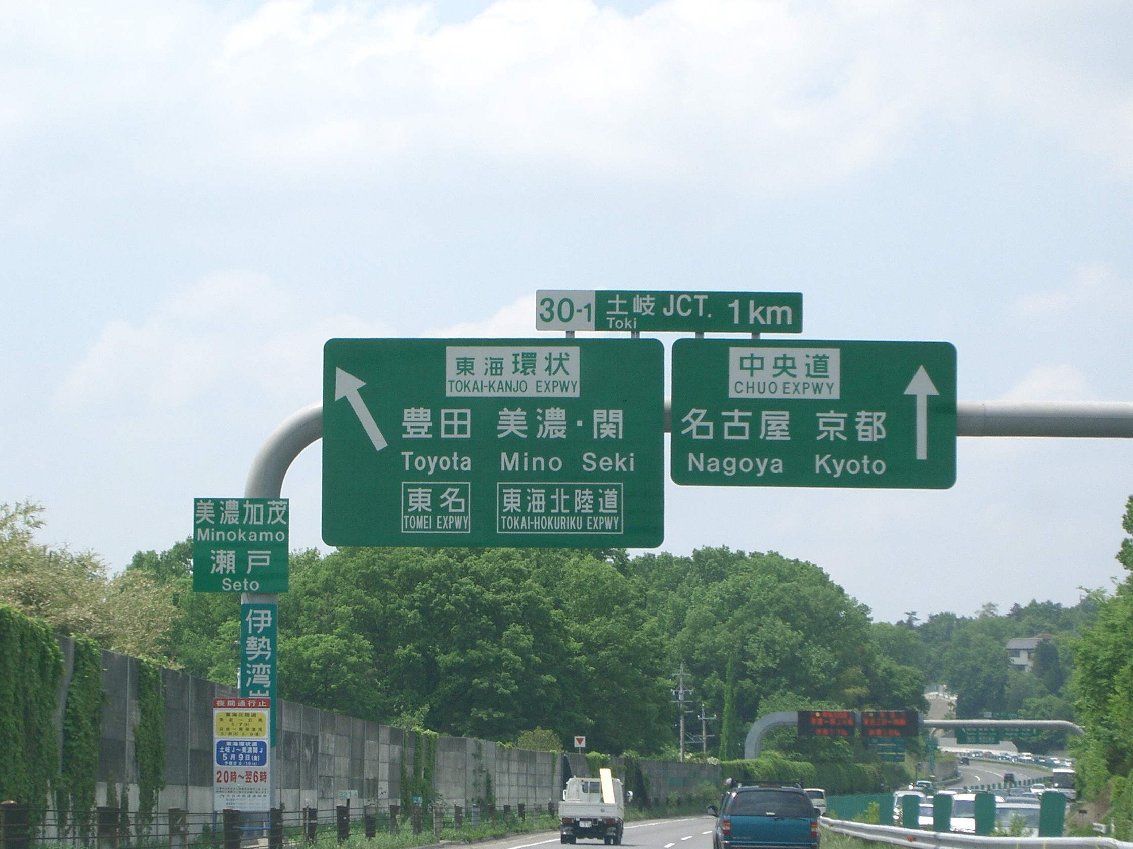 TyuotokiJCT(中央道土岐JCT下り)